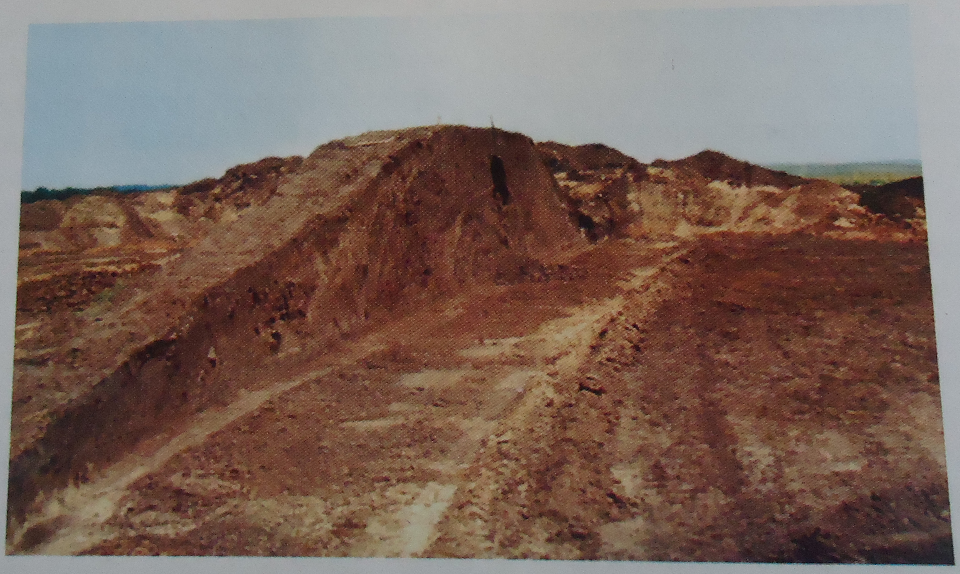 Розріз кургану Водяна Могила